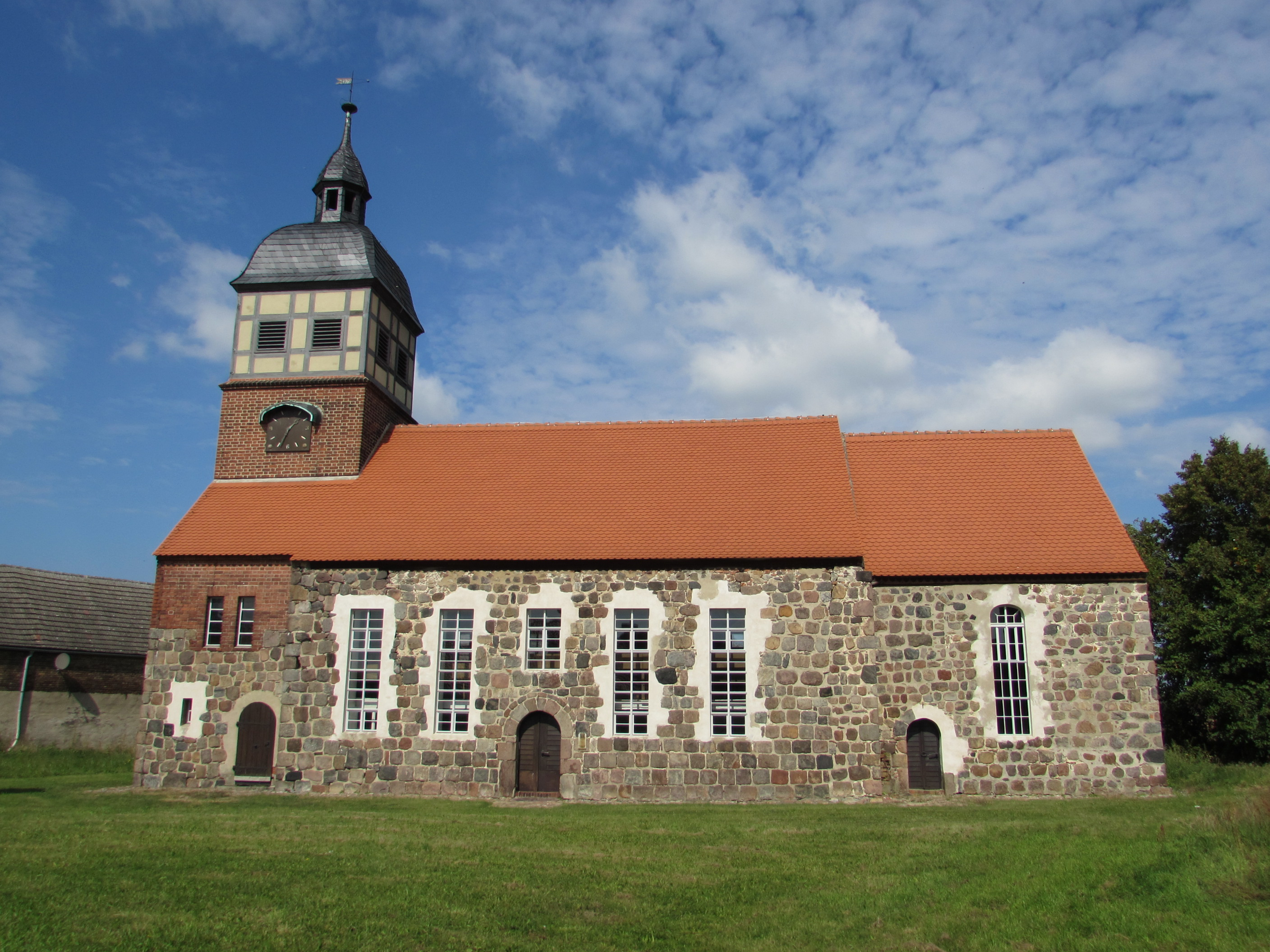 kirche glienecke (ziesar) von süden